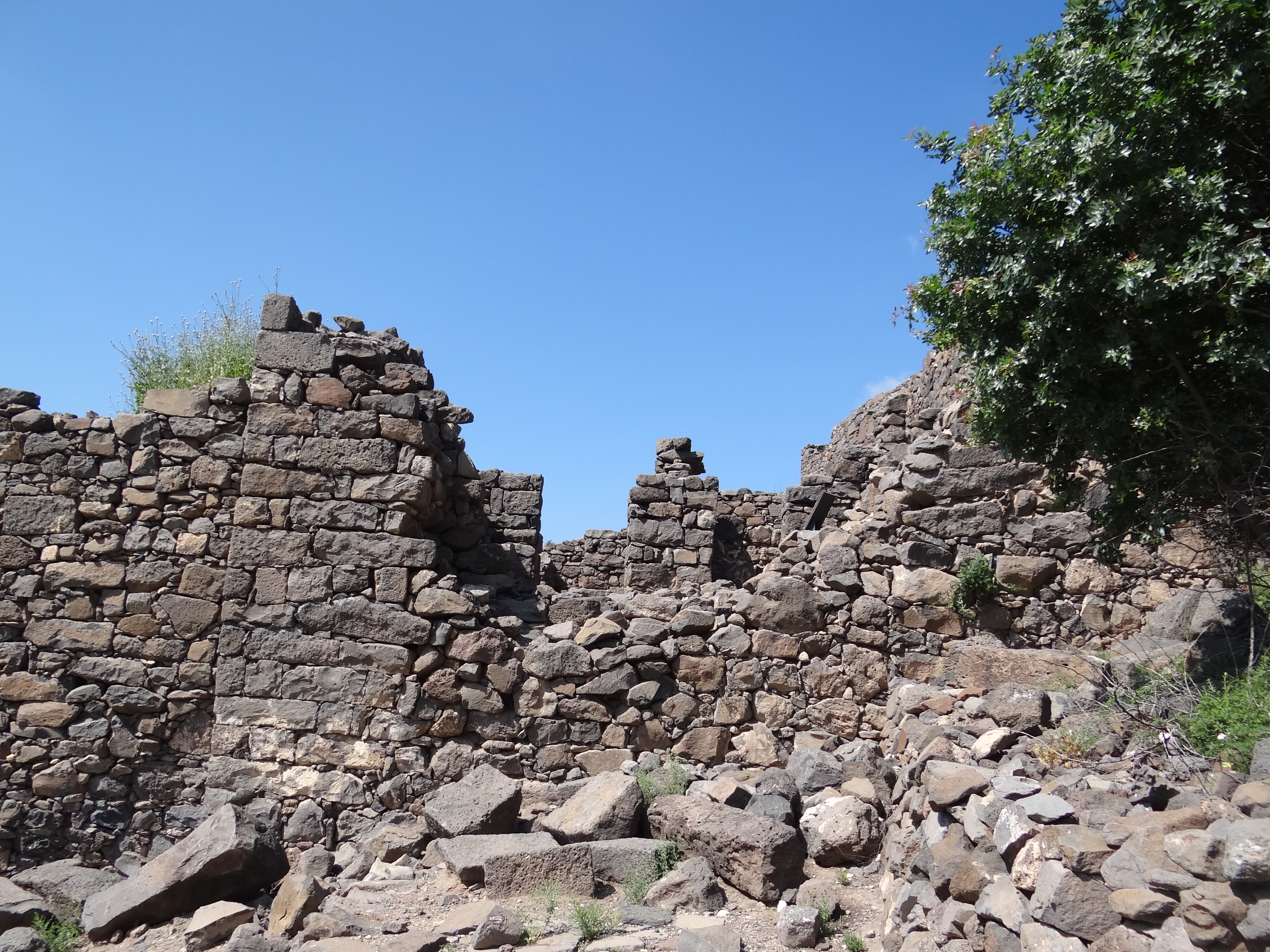 Gamla archaeology site אתר ארכאולוגי גמלא ברמת הגולן הפירצה בחומה